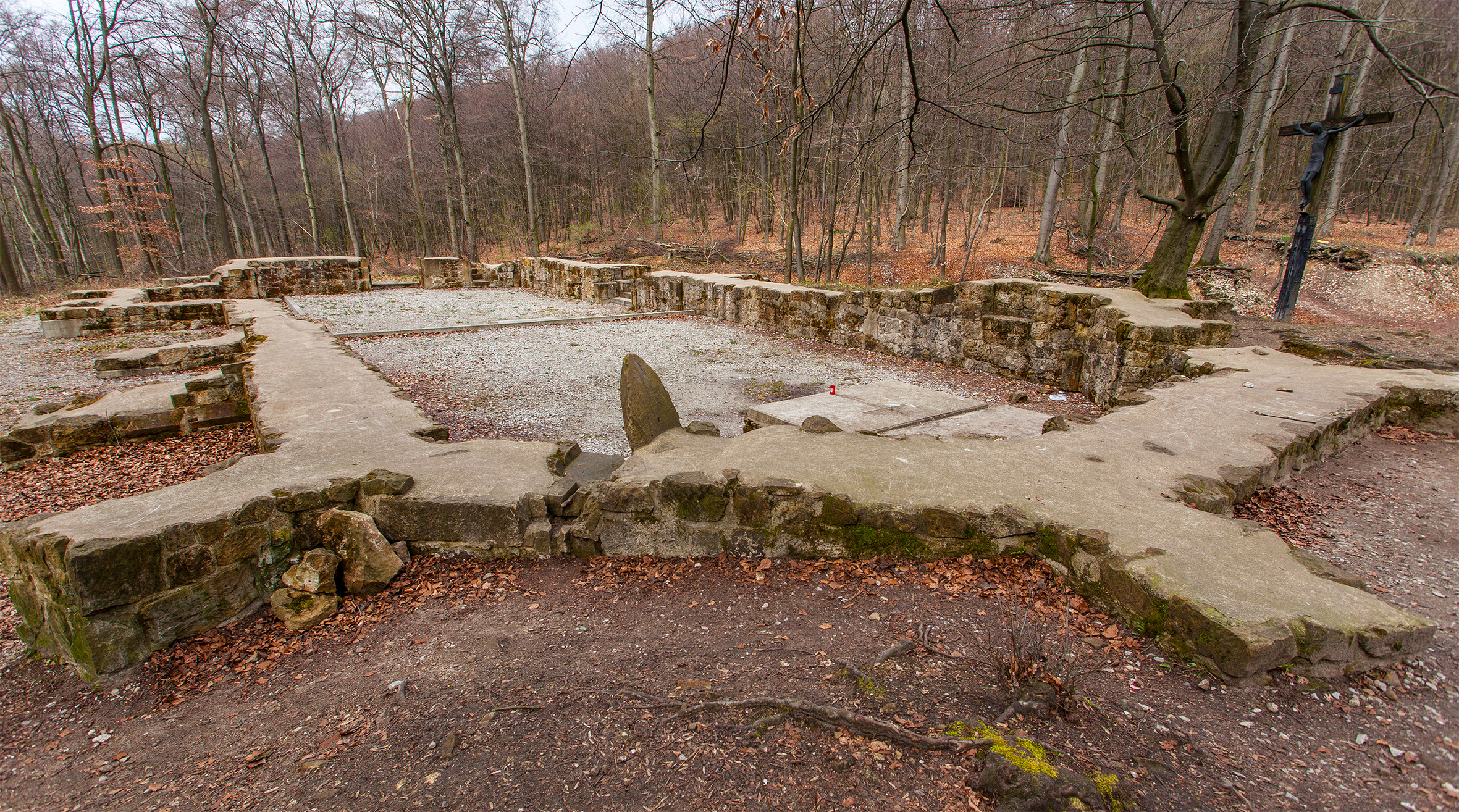 Die Reste des Jostbergklosters im Teutoburger Wald südwestlich von Bielefeld. Ansicht von Norden.